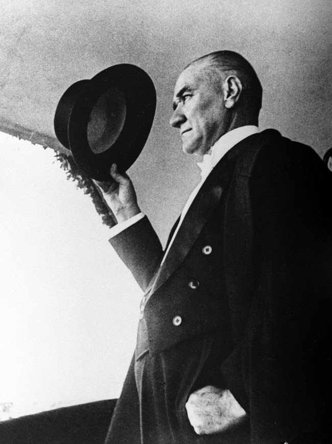 Cumhuriyet Bayramı kutlamaları sırasında Atatürk'ün şapkasıyla selam verirken çekilmiş bir fotoğrafı.